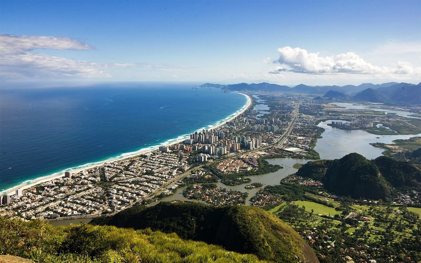 Panorama da Barra da Tijuca, na cidade do Rio de Janeiro, Brasil.